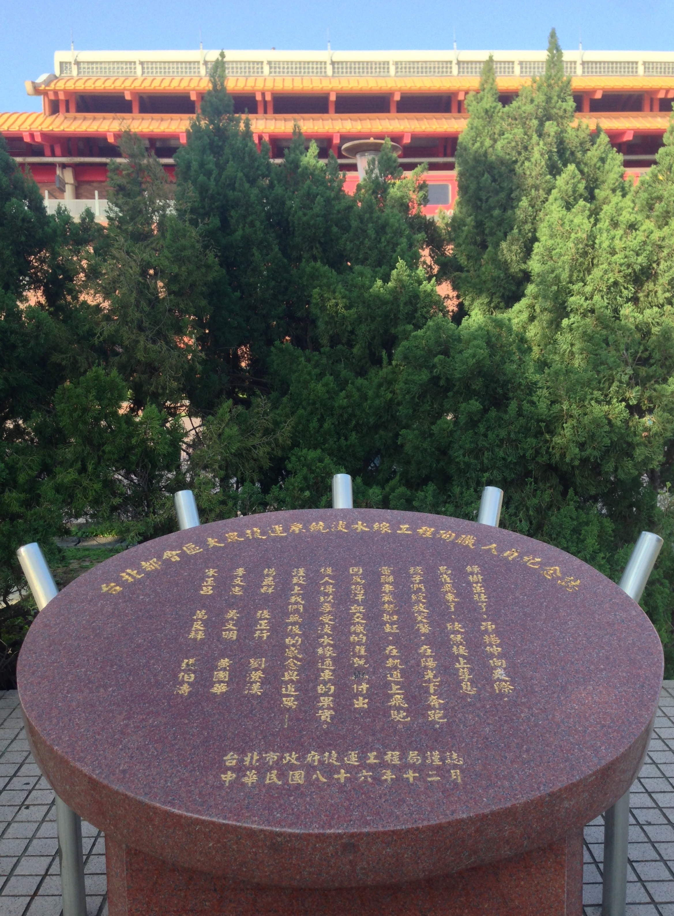 中文（台灣）: 臺北捷運淡水線工程殉職人員紀念碑，1997年12月臺北市政府捷運工程局謹誌。